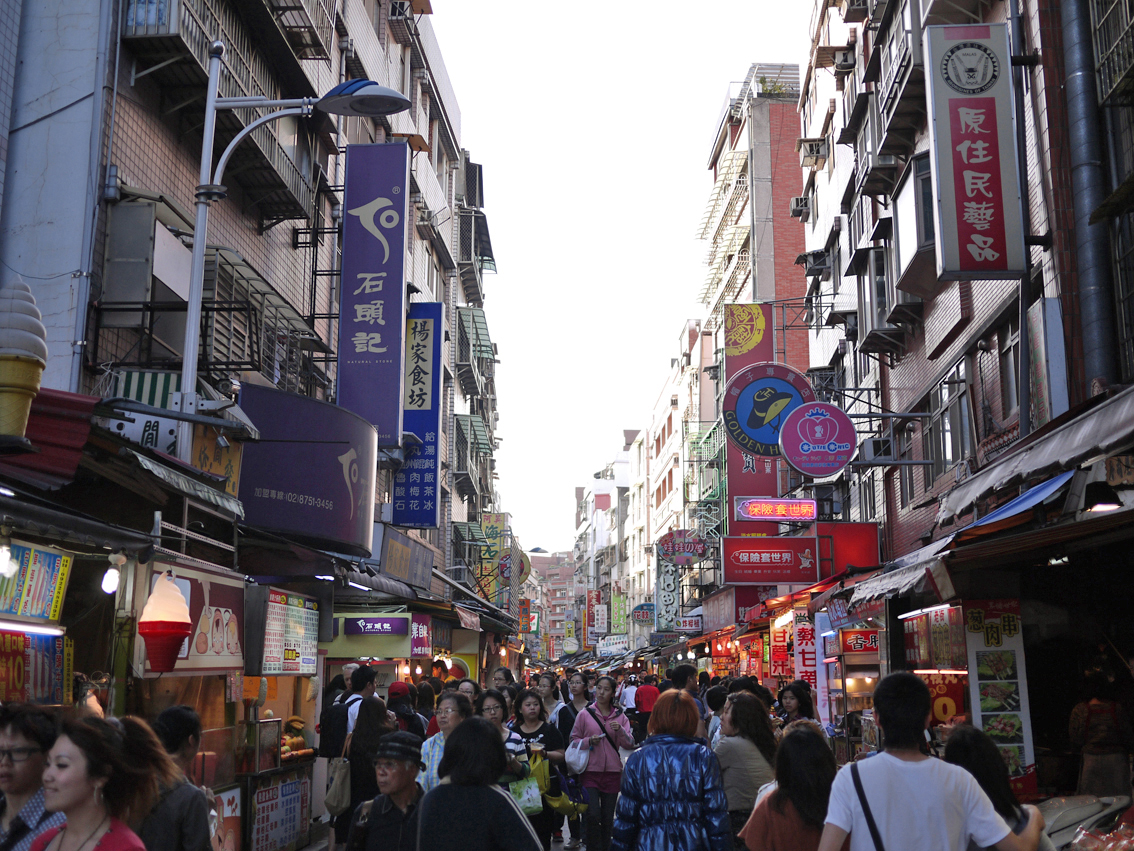 中文（台灣）: 新北市淡水老街。